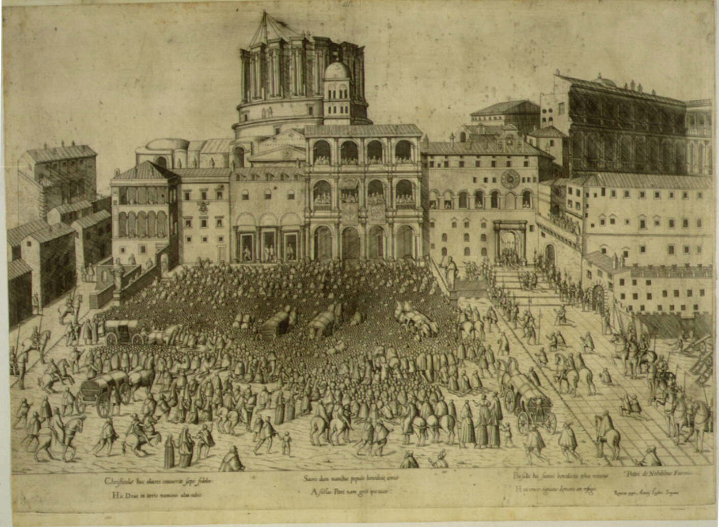 Estampa publicada por Antonio Lafreri, Speculum Romanae Magnificentia. Muestra la basílica de San Pedro en construcción, inacabada la cúpula.